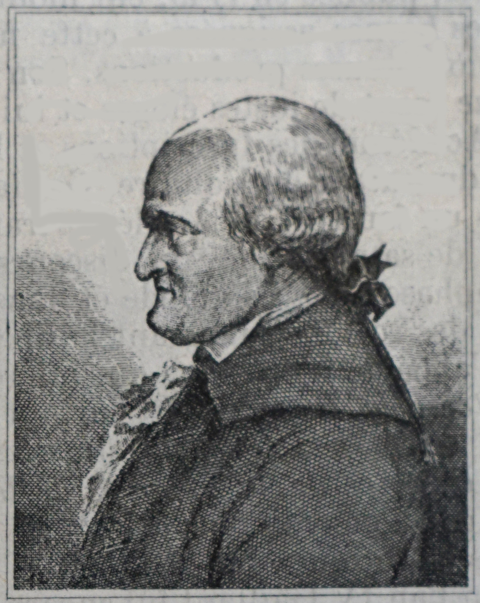 in "almanach Matot-Braine 1915-17".